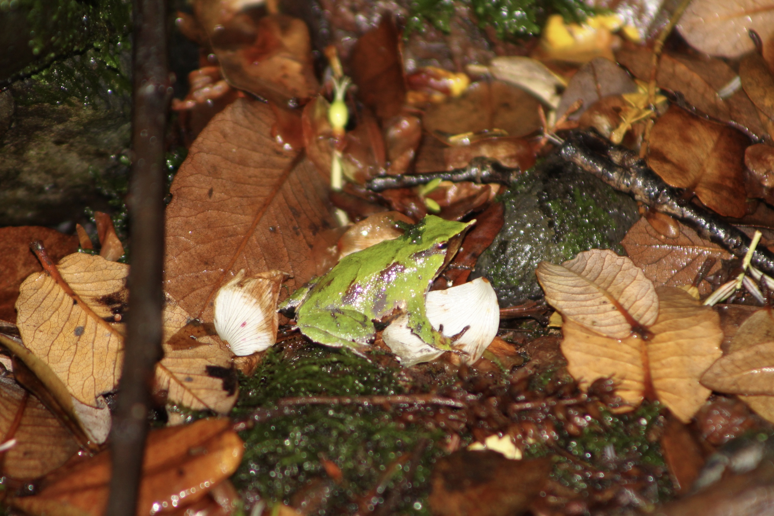 Ranita de Darwin, en peligro de extinción, se encuentra en u programa de conservación en la reserva biológica Huilo Huilo